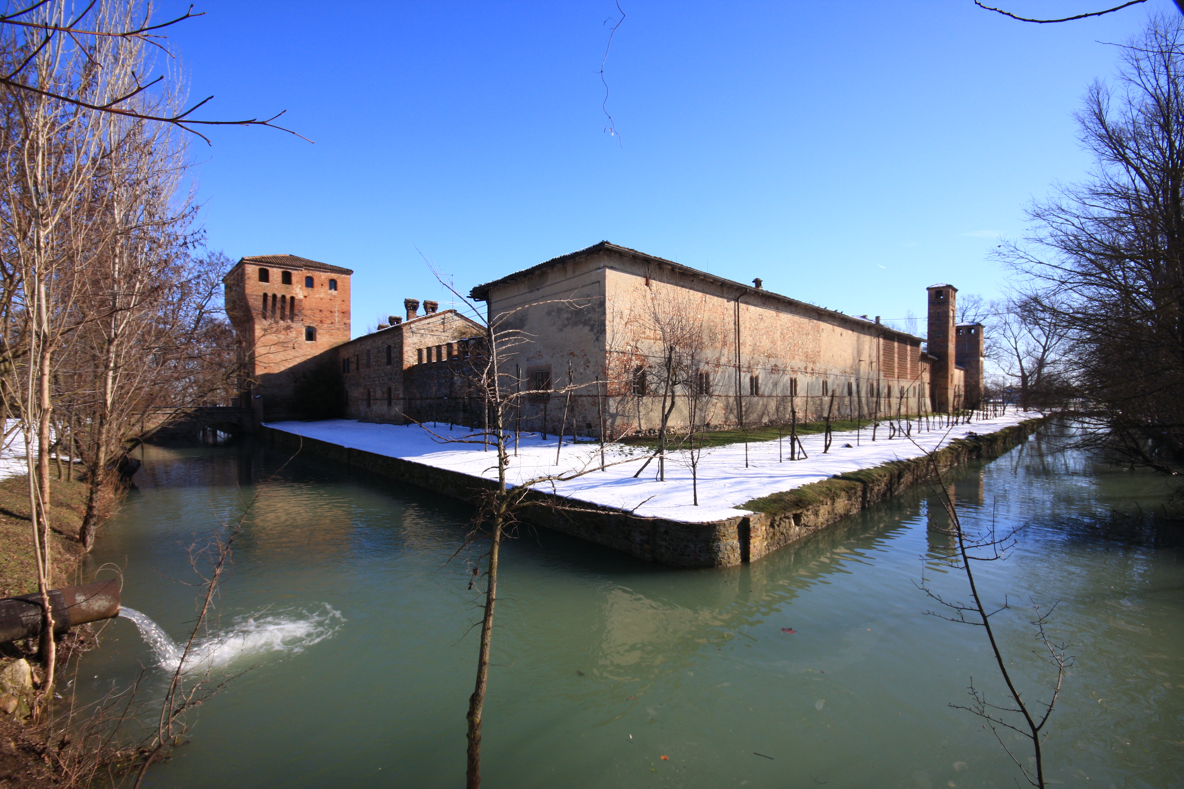 Castello di Paderna This is a photo of a monument which is part of cultural heritage of Italy.